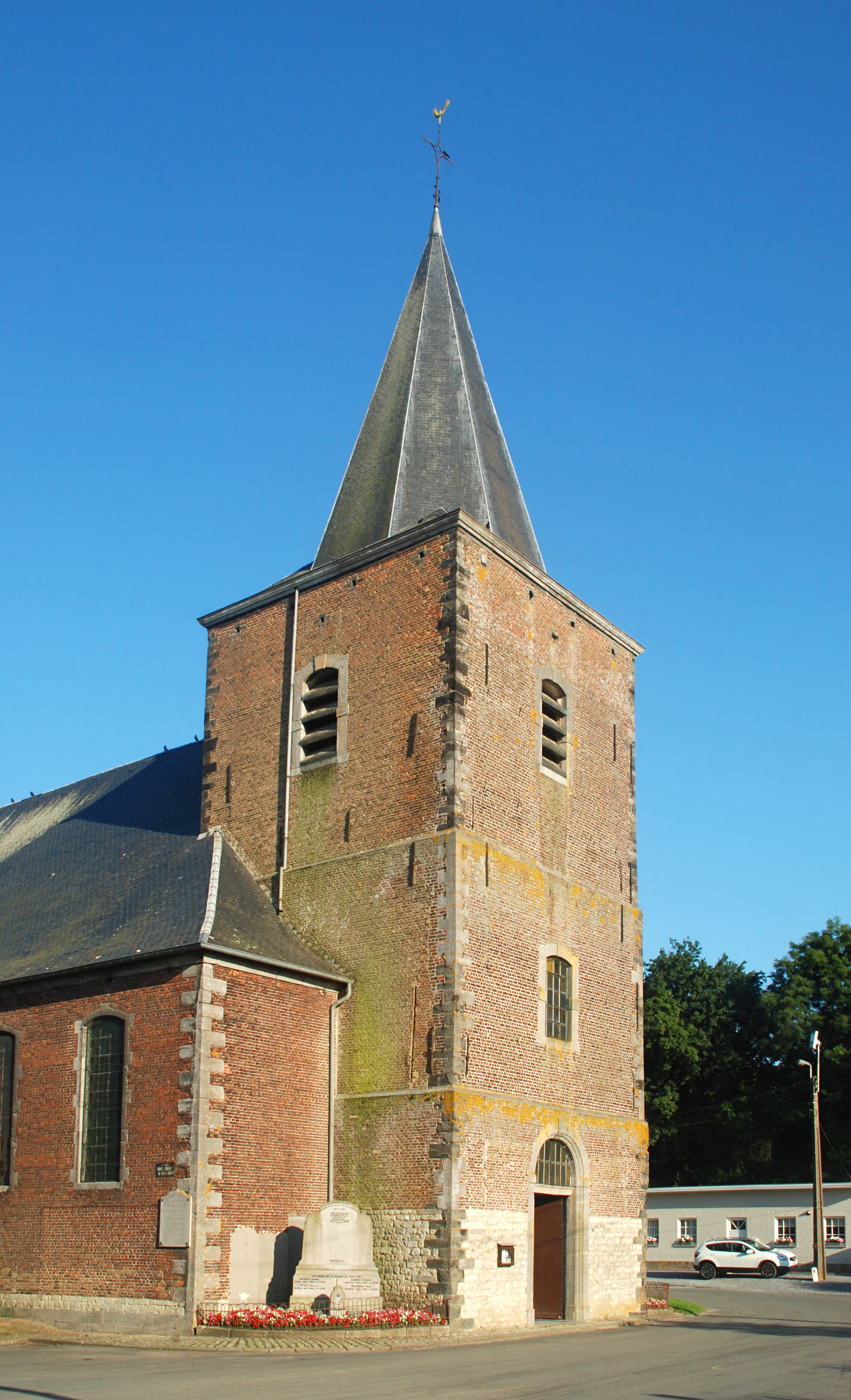 Belgique - Brabant wallon - Église Saint-Martin de Ways